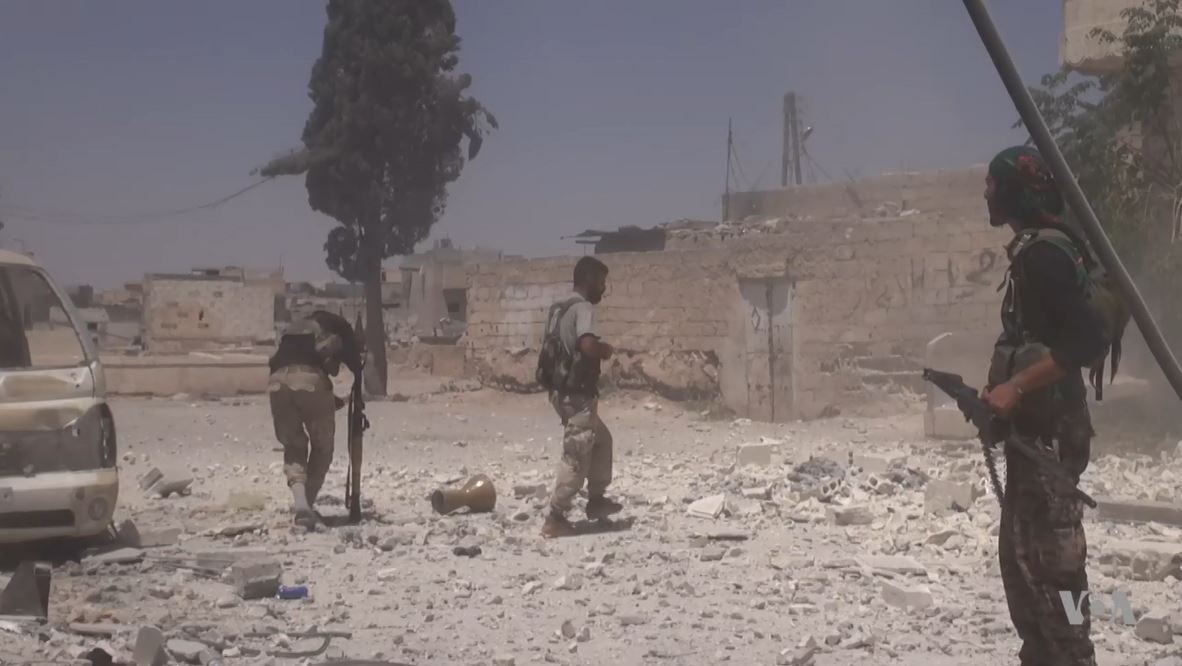 Membres des FDS à Manbij, le 29 juillet 2016.